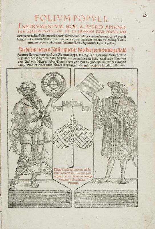 Folium populi. Instrumentum hoc a Petro Apiano iam recens inuentum, et in figuram folii populi rfdactum per radios solis toto orbe horas communes ostendit, ... In disem newen Instrument, das die form vuud gestalt .... - [Ingolstadt] : [Peter Apianus], [s.d.] (Excusum Ingolstadii, 22 die Mensis Octobris 1533). - [12] c., 1 c. di tav. ripieg. : ill. ; fol. .